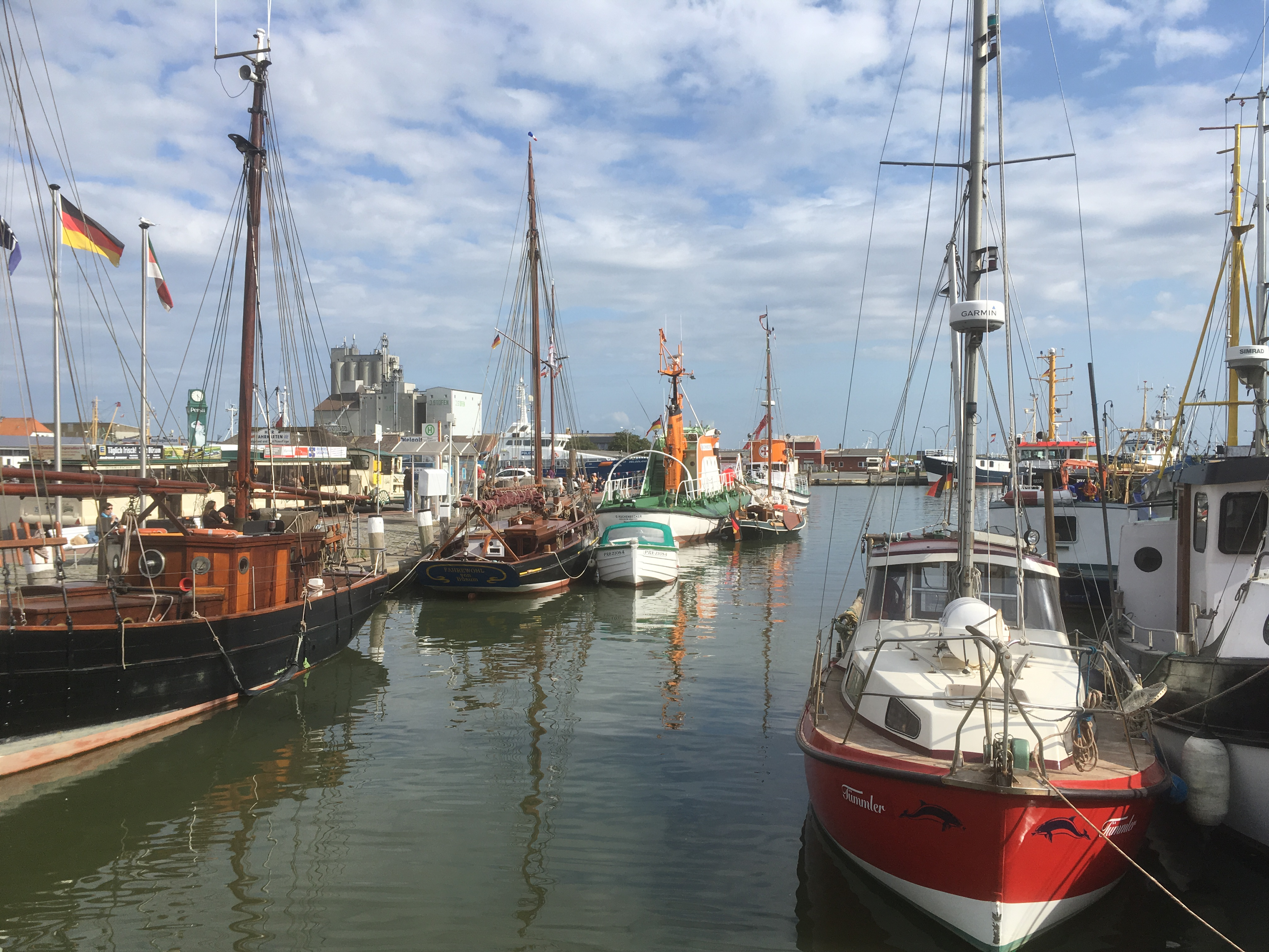 Der "Ole Hoov", der Museumshafen, ist voll